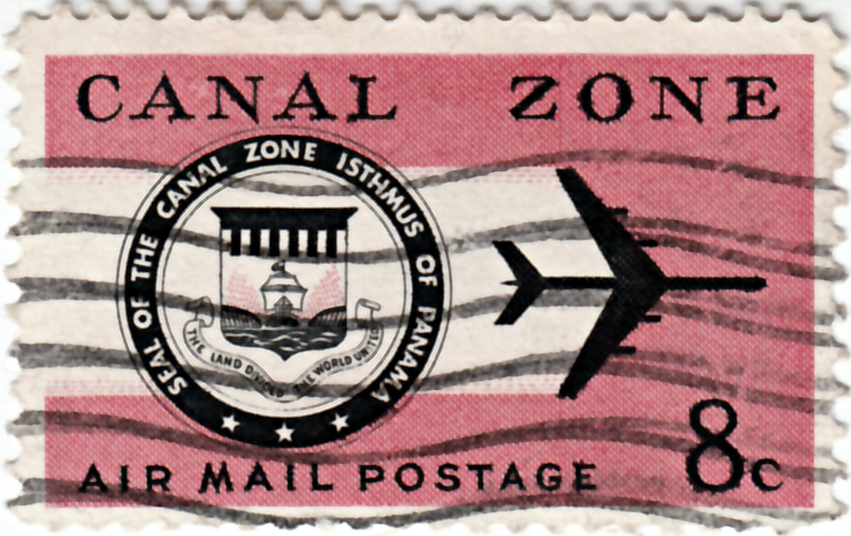 Panama Canal Zone air mail stamp